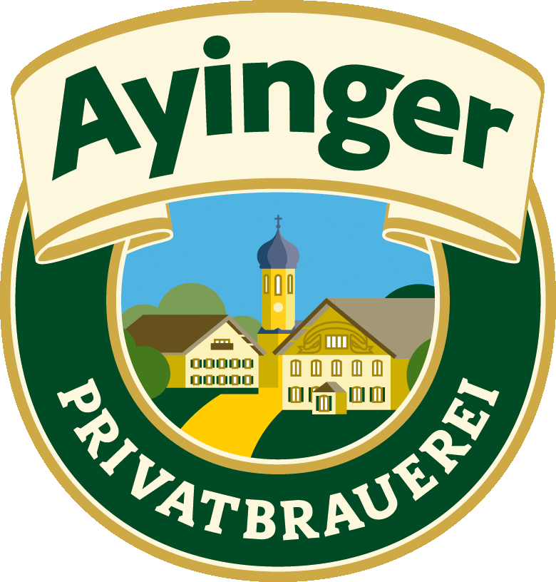 Aying